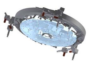 E-ELT-M2-mirror 4-m Convex Aspheric f/1.1 Passive + Position Control